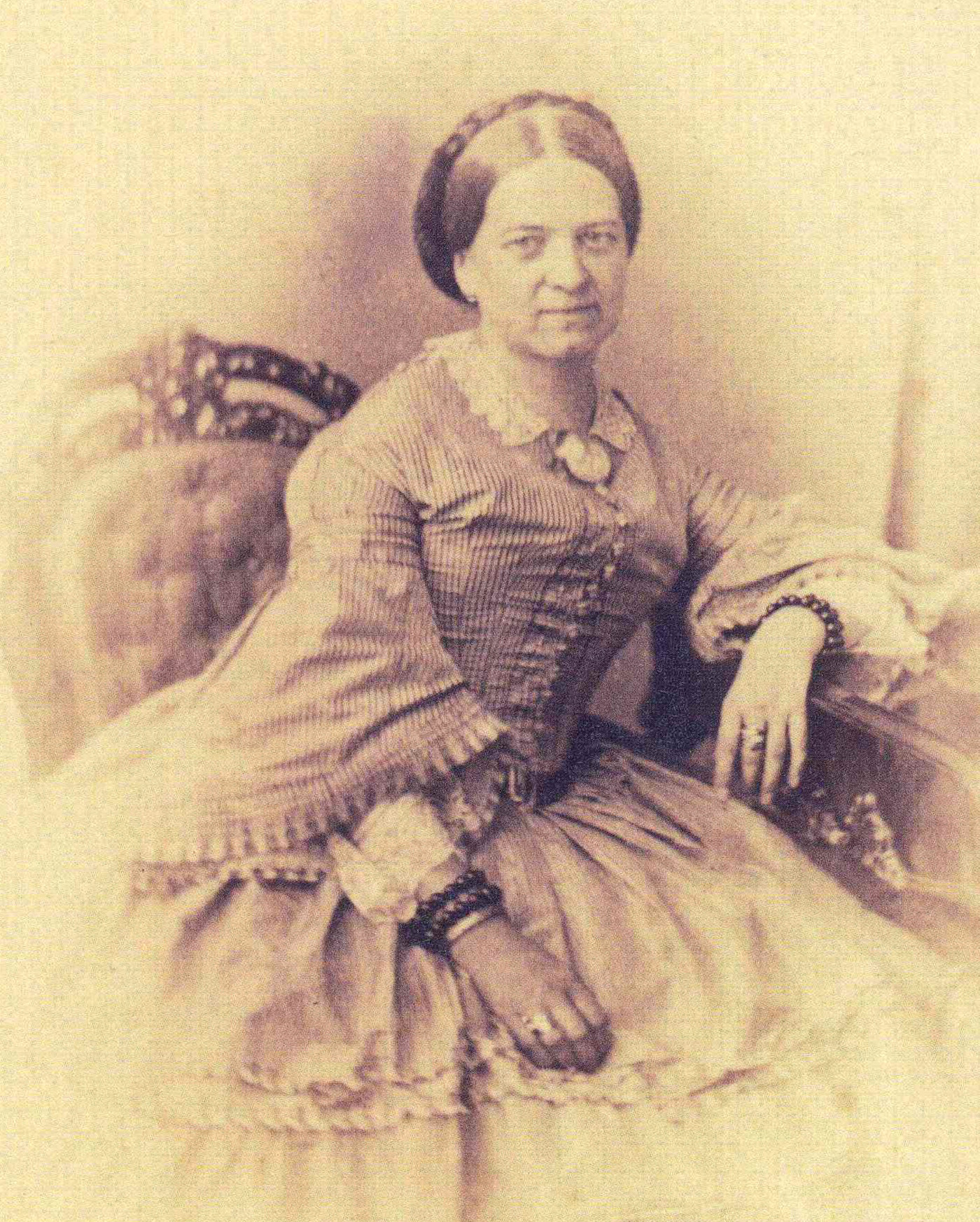 Ritratto della contessa Clara Maffei.